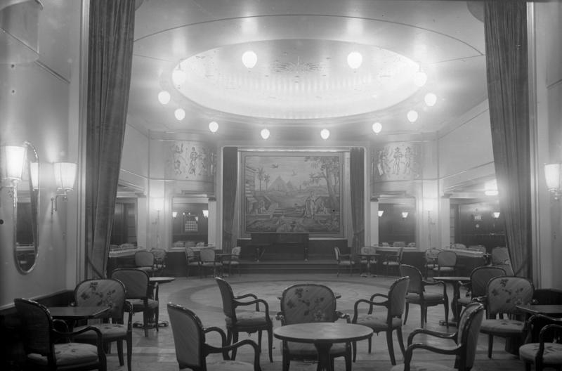 Die erste Probefahrt der "Europa", Deutschlands großtes Schiff verläßt Hamburg. Der Ballsaal mit seiner schönen architektonischen Ausstattung auf der "Europa".